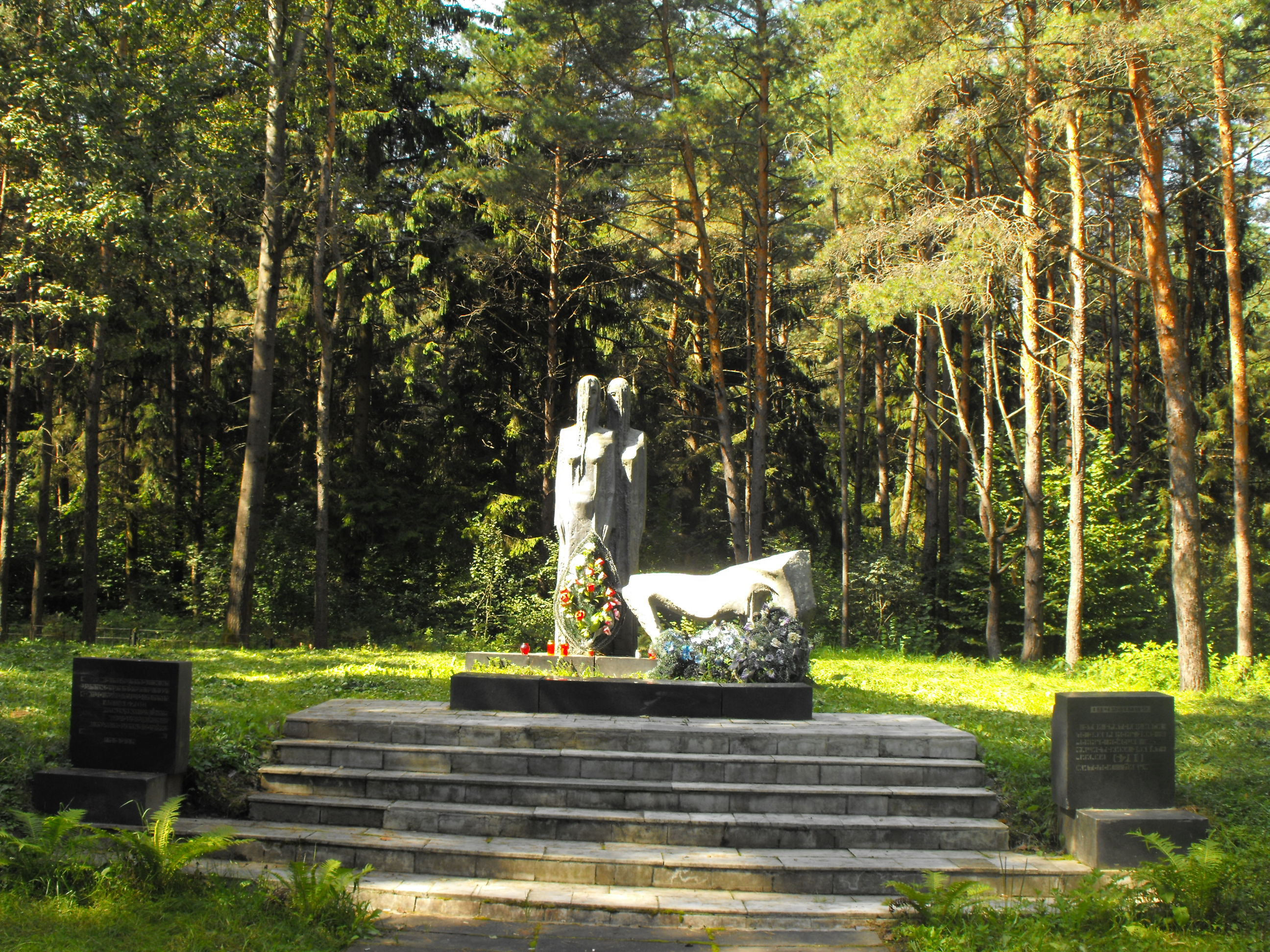 Мемориал на месте убийства нацистами и их пособниками 6700 евреев Лиды. Находится в 150 метрах от кольцевой дороги Лиды на продолжении улицы Красноармейская справа от неё в лесу, рядом с мемориалом "Детская могила".